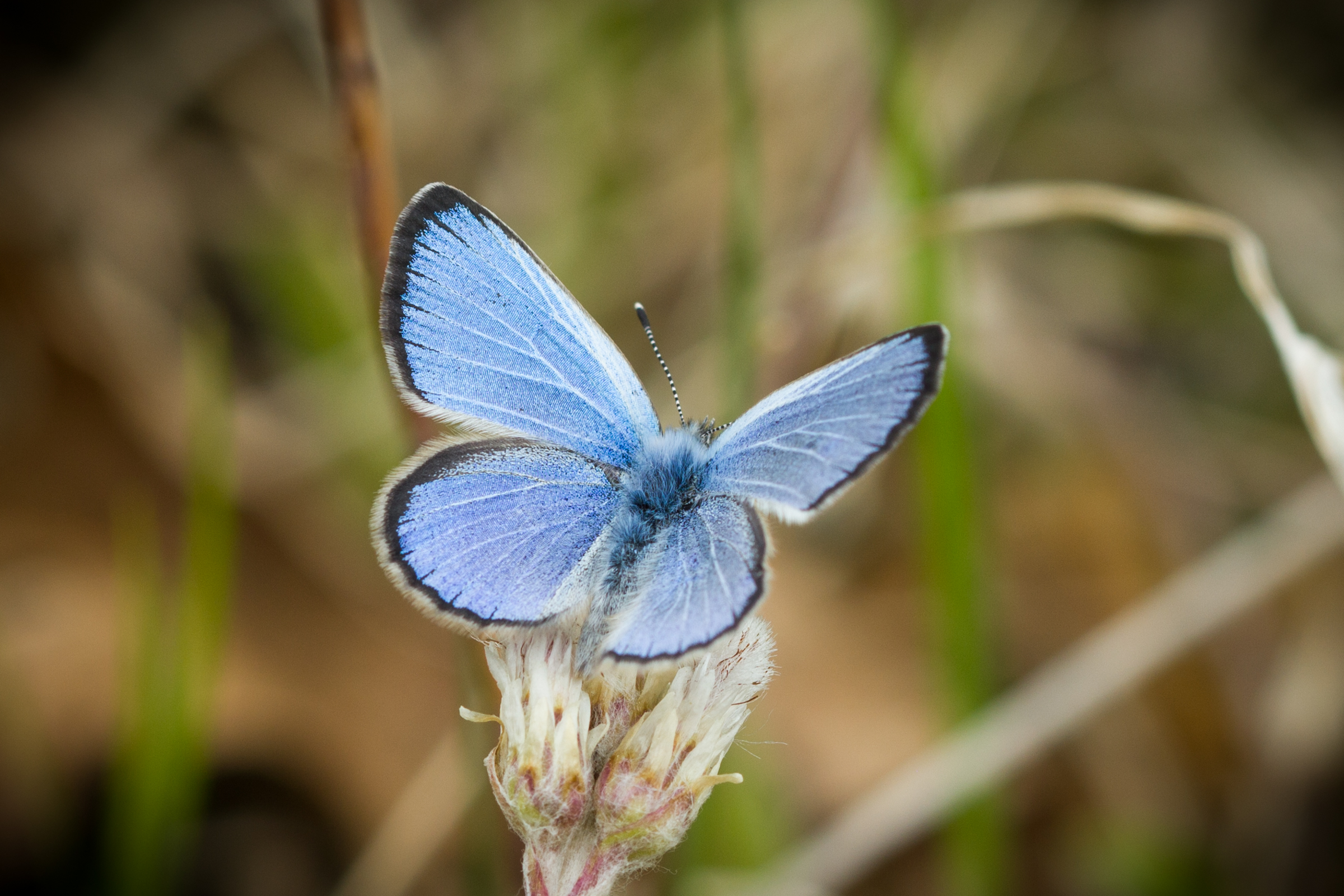 Silvery blue butterfly